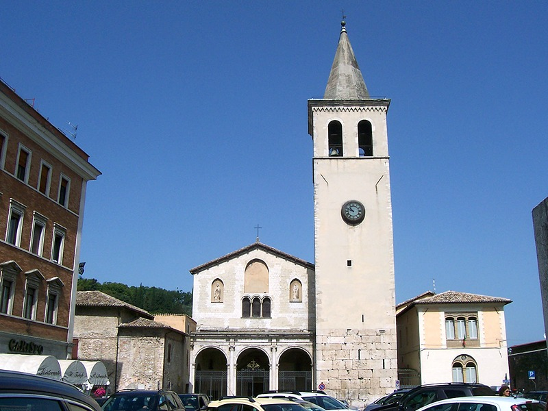 Spoleto - Chiesa di S. Gregorio Maggiore